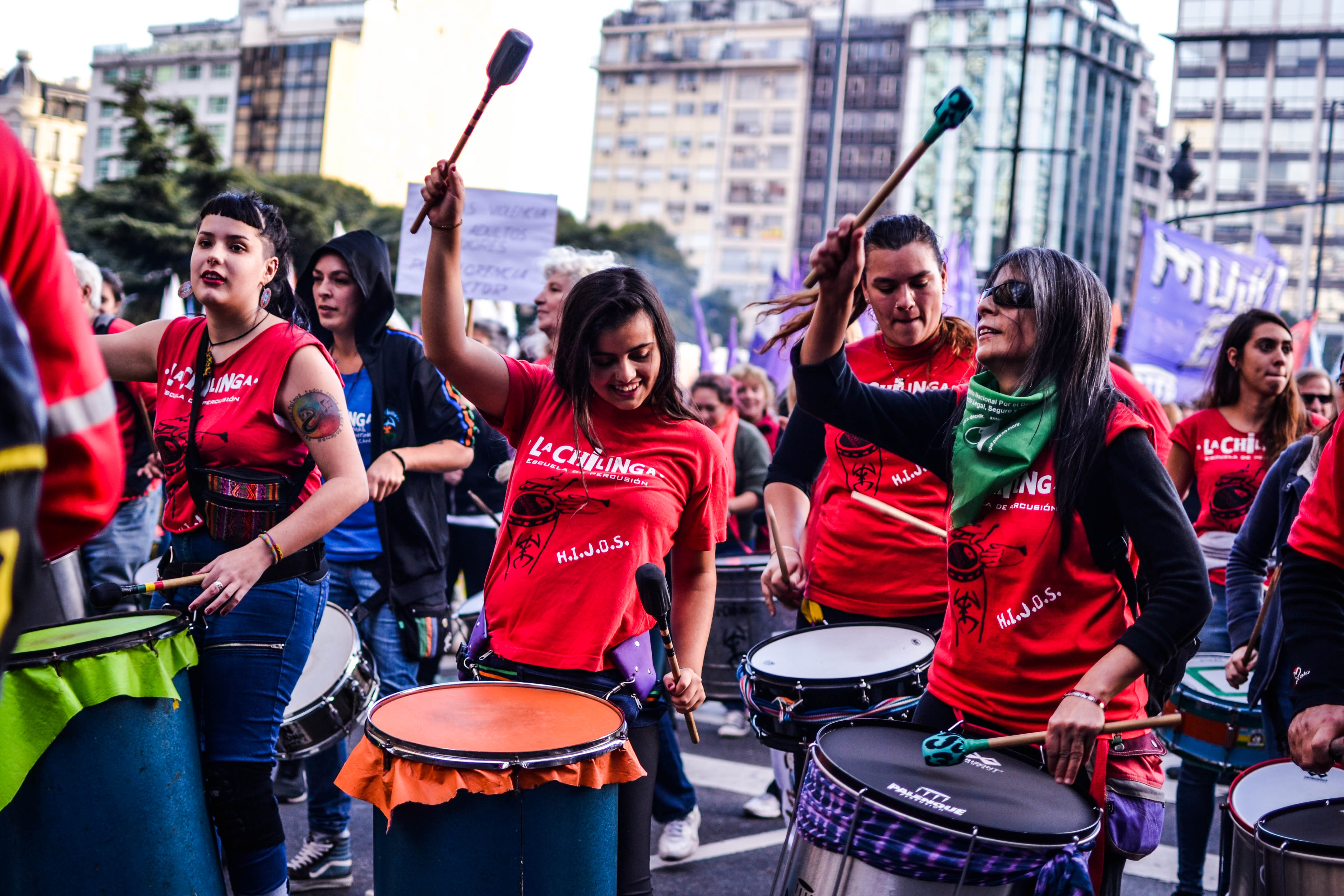 El 3 de junio se realiza en toda la Argentina la marcha contra la violencia femenina denominada Ni una menos (promocionada en redes sociales como #Niunamenos). En Buenos Aires, la misma empezó en el Congreso de la Nación recorriendo la Av de Mayo finalizando en la Plaza homónima.